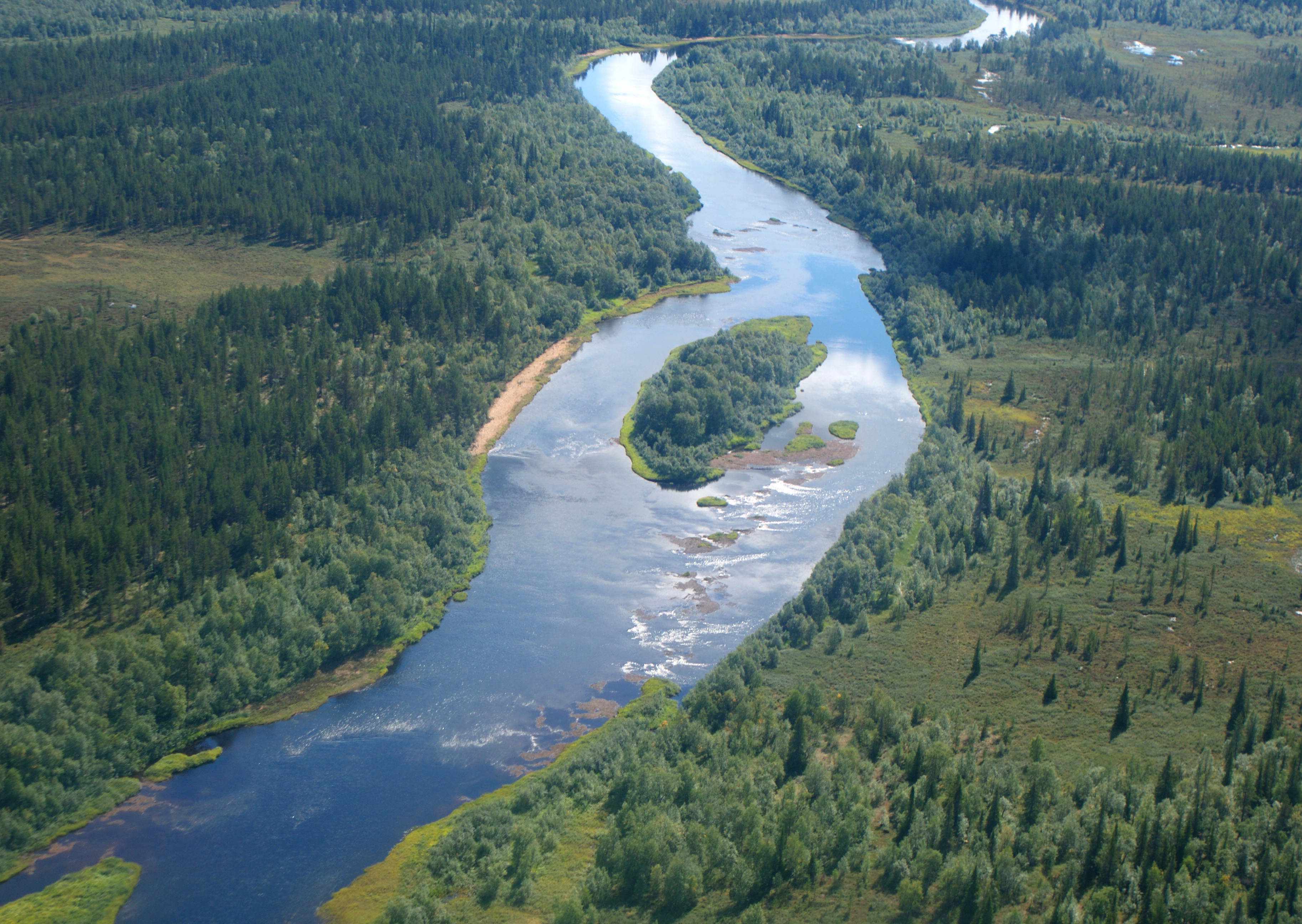 Понойский рыбохозяйственный заказник: Ловозерский район, Мурманская область This image is related to the protected area of Russia number 5110090